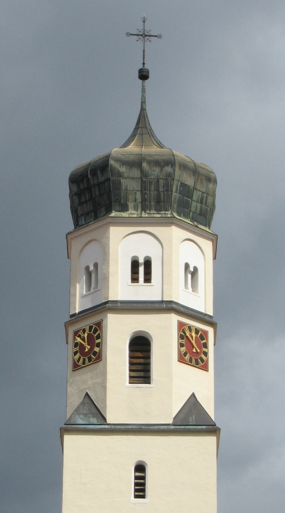 katholische Herz-Jesu-Kirche in Schelklingen.